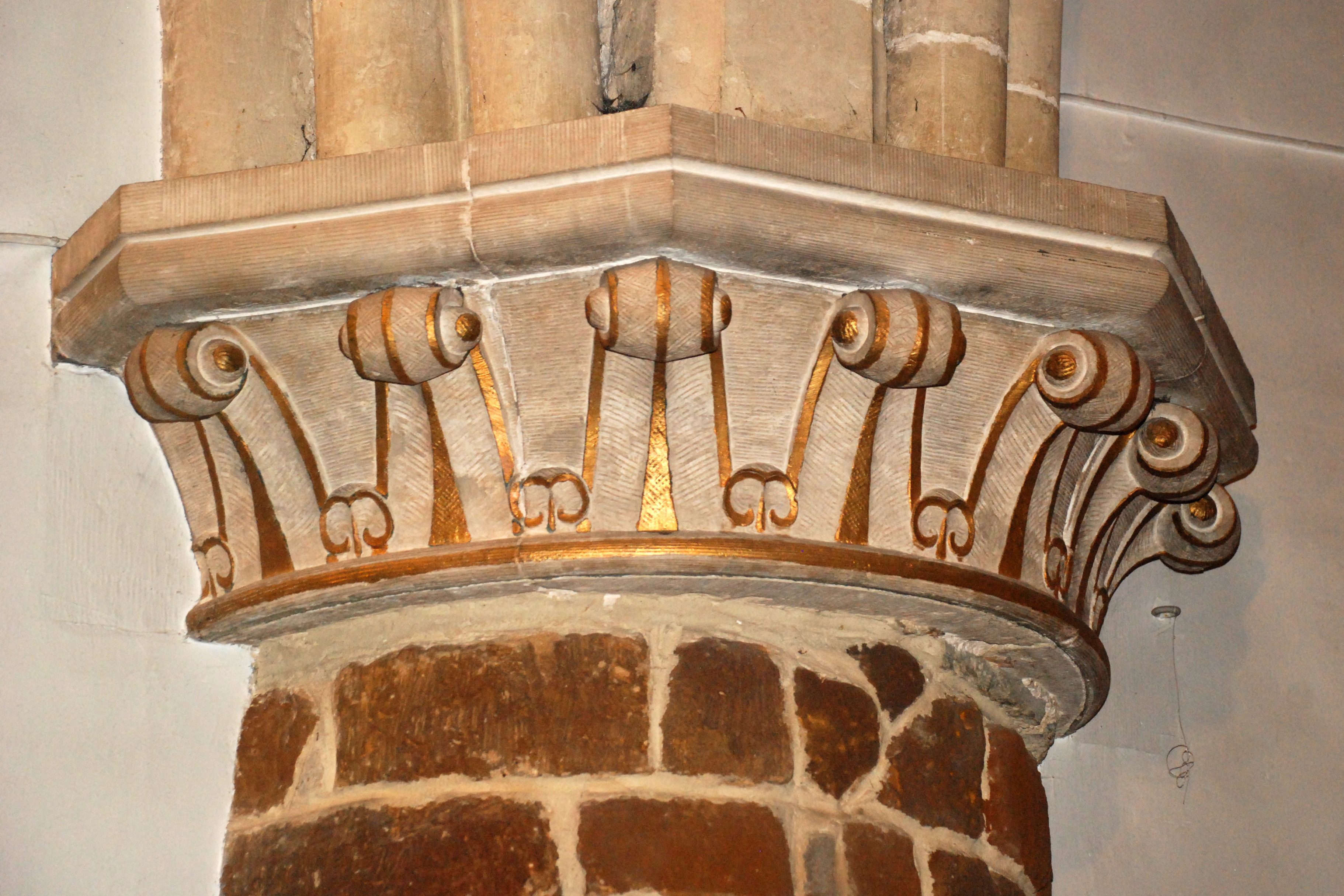 Belgique - Brabant wallon - Chaumont-Gistoux - Église Saint-Bavon de Chaumont